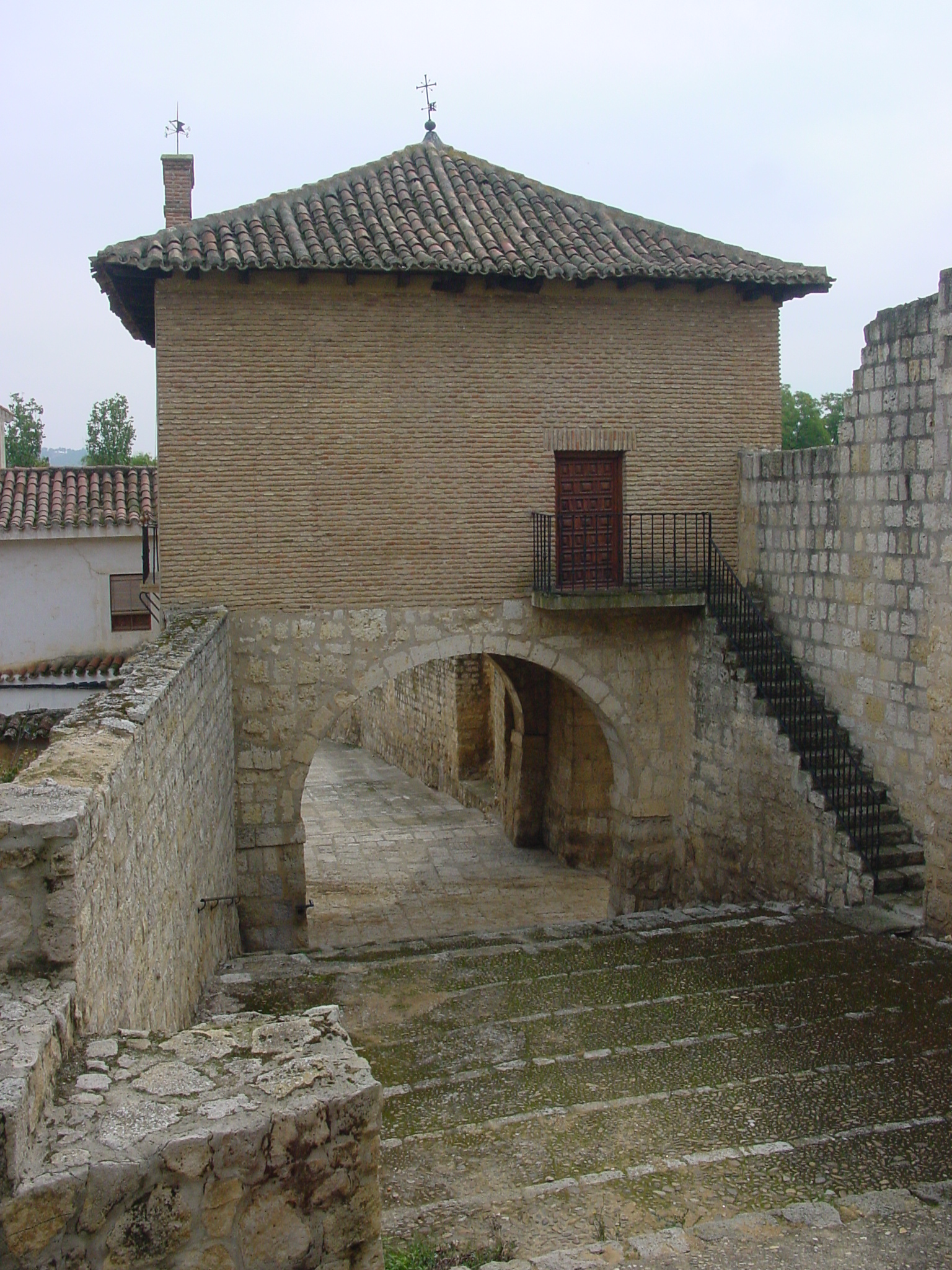 Medina de Rioseco en la provincia de Valladolid, España. Puerta de Zamora.